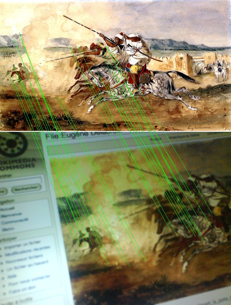 Résultat de mise en correspondance de deux images par la méthode SIFT